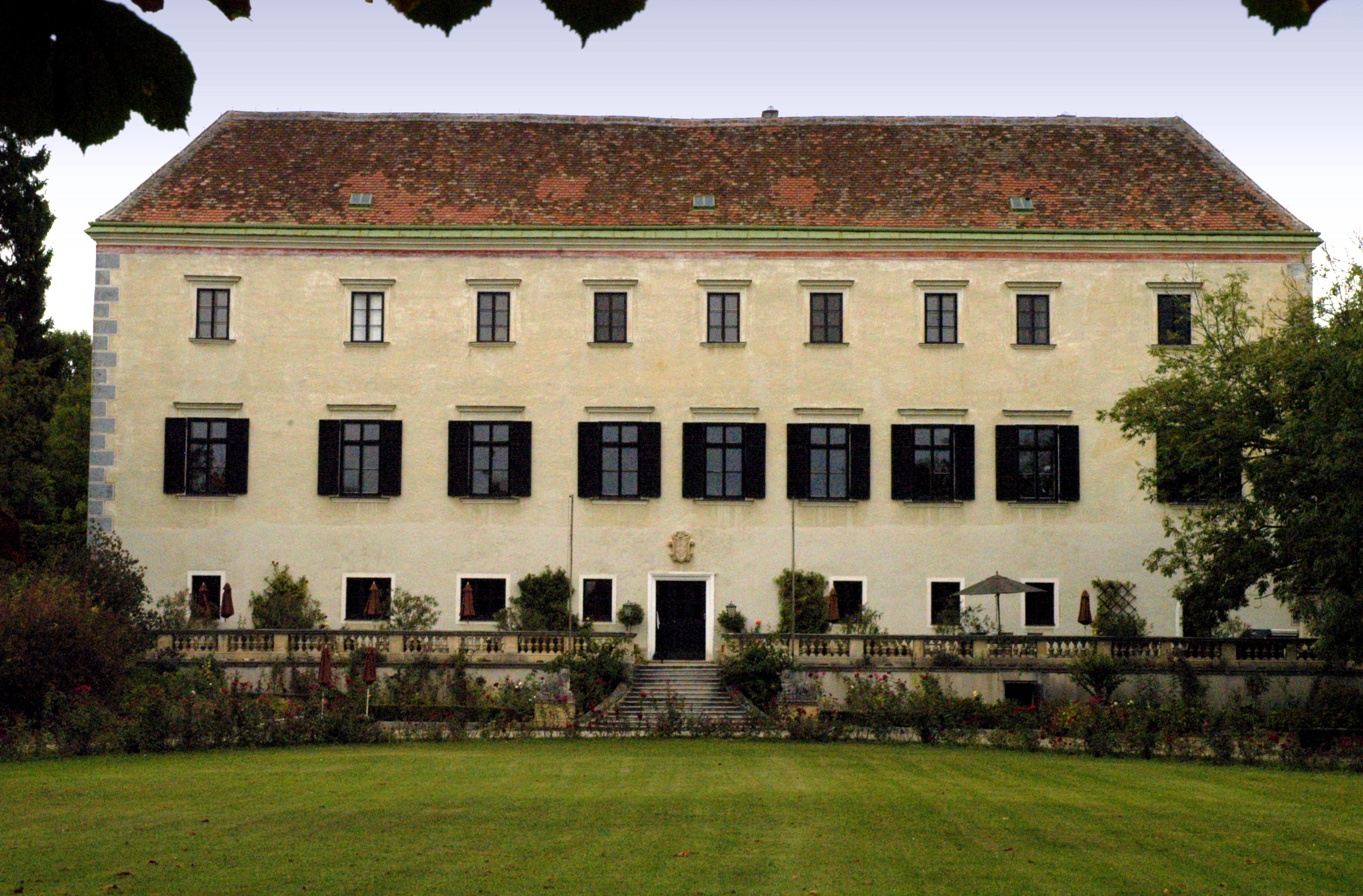 Schloss Mittergrabern, Gemeinde Grabern